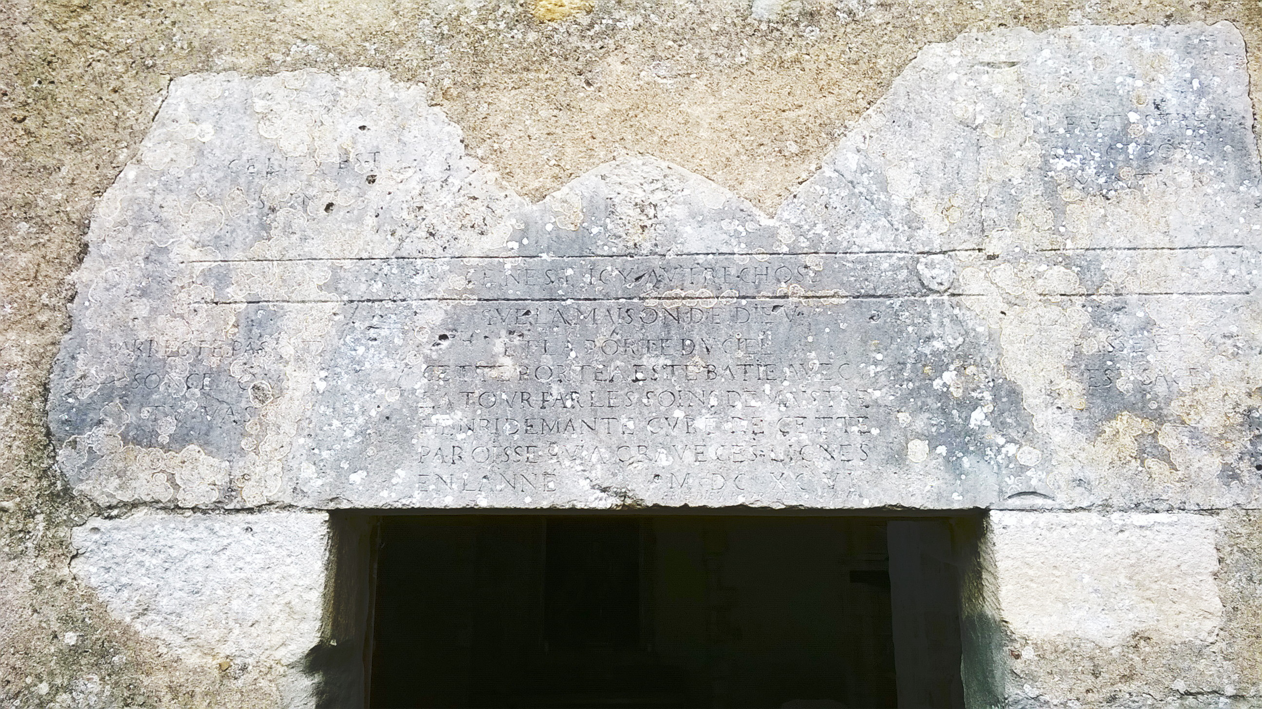 Nailly : inscription au dessus de la porte de l'église Saint-Pierre datée de 1696. « CE NEST ICY AVTRE CHOSE QUE LA MAISON DE DIEV ET LA PORTE DU CIEL CETTE PORTE A ESTE BATIE AVEC LA TOUR PAR LES SOINS DE MAISTRE HENRI DE MANTE CVRE DE CETTE PAROISSE QVI A GRAVE CES LIGNES EN LANNE M DC XC VI »